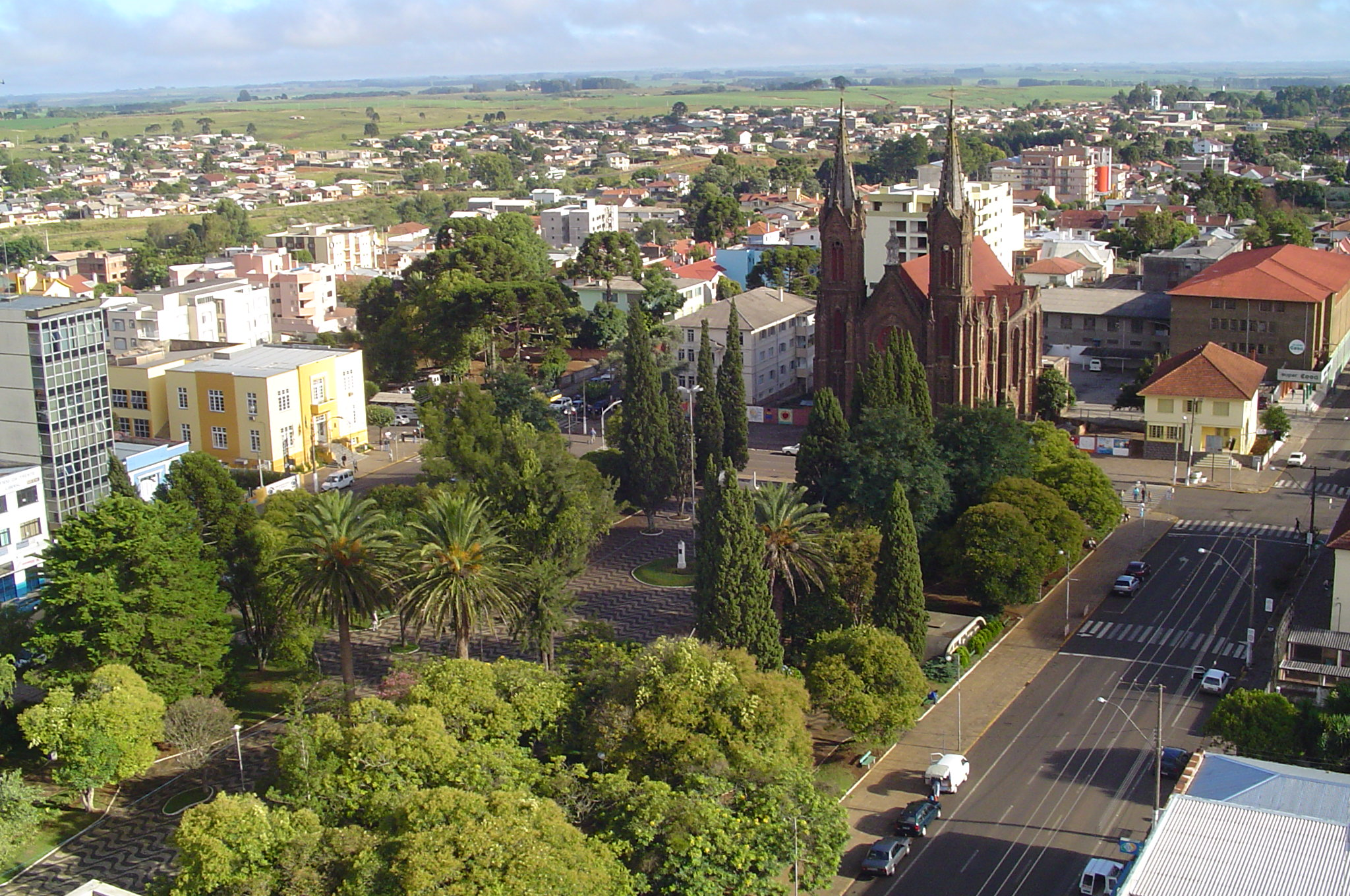 Vista da praça central do município de Vacaria, RS, Brasil